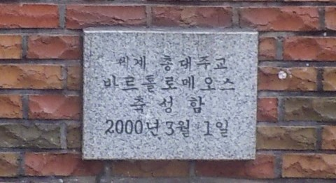 釜山生神女福音聖堂の定礎